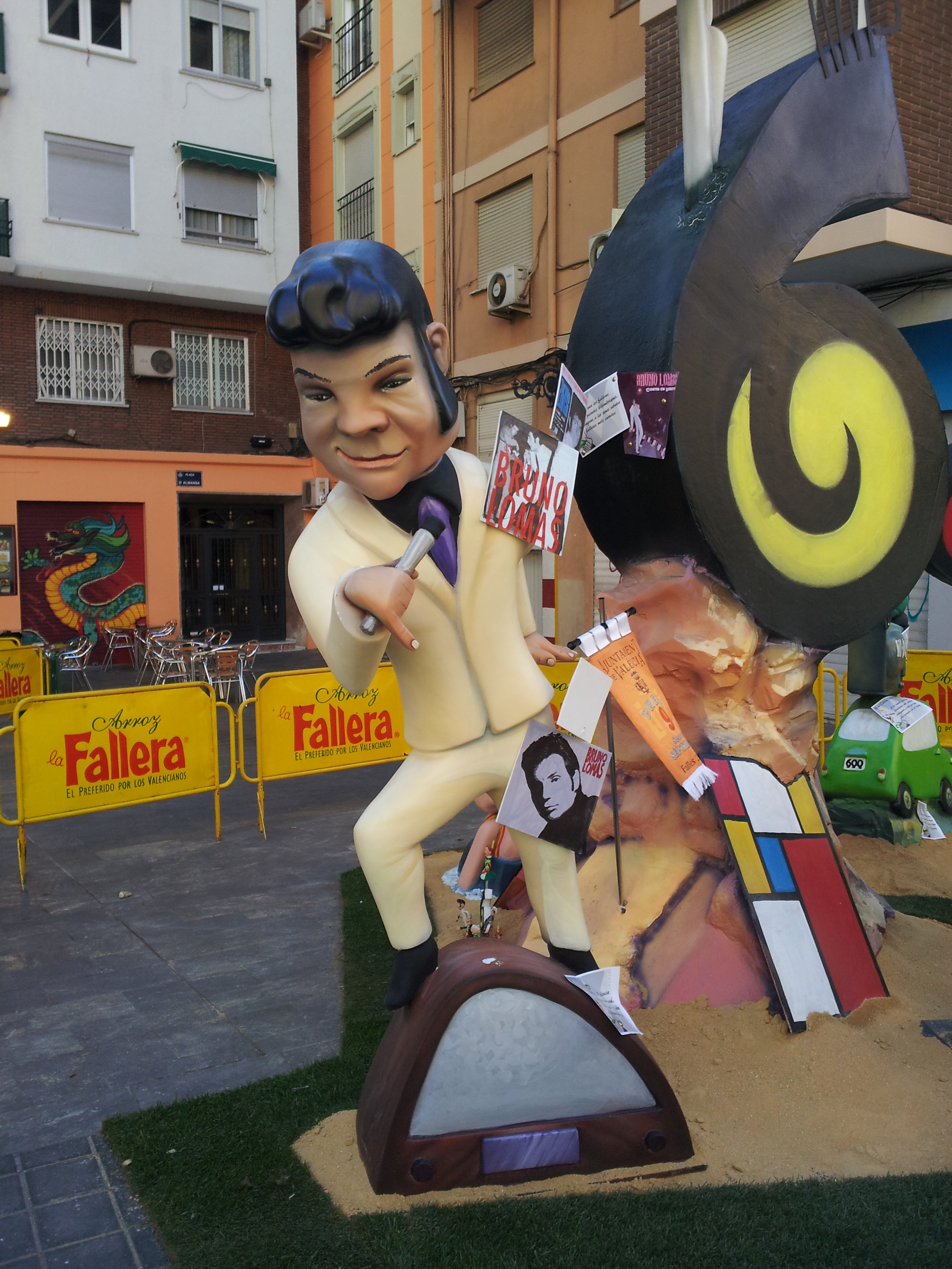 Bruno Lomas.